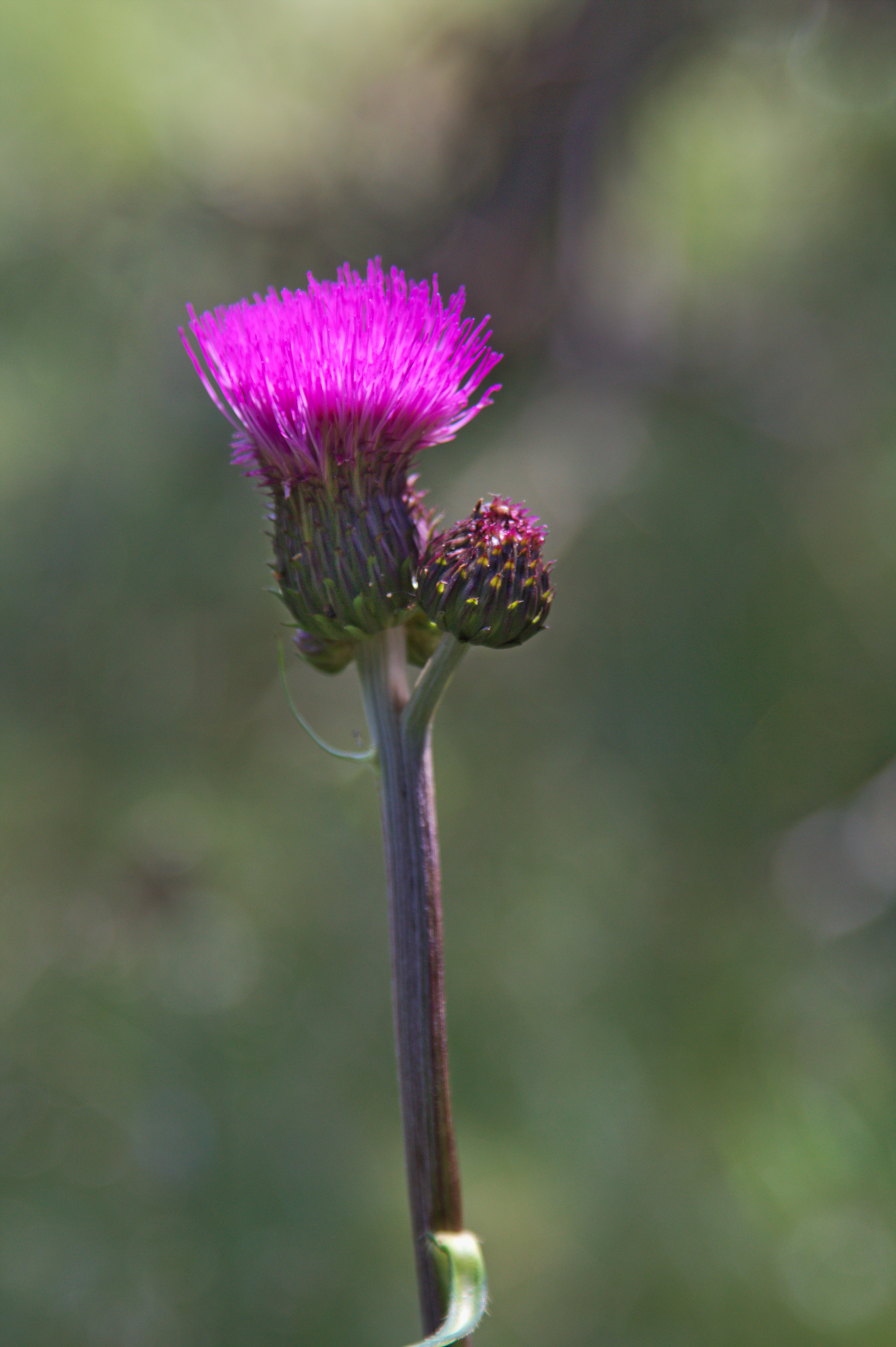 Úval Dolní Přibrání (přírodní památka) - Cirsium heterophyllum (L.) Hill, pcháč různolistý - status ohrožení v ČR: není